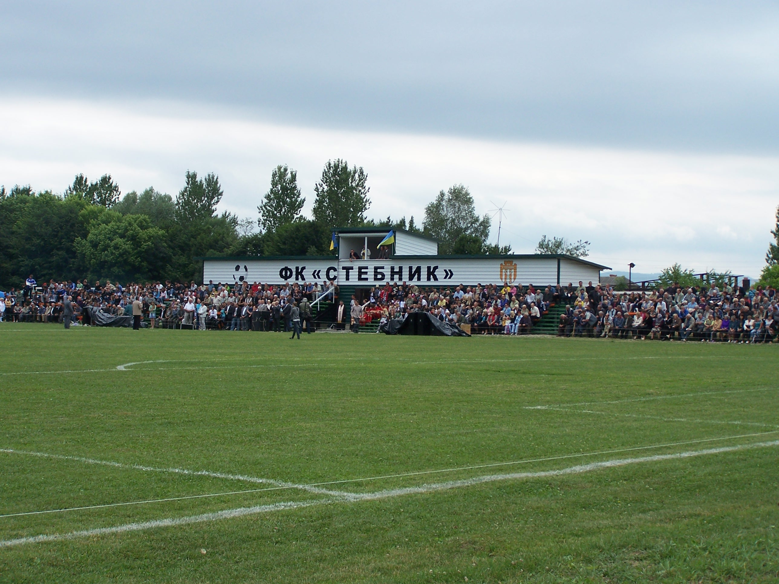 Stebnyk